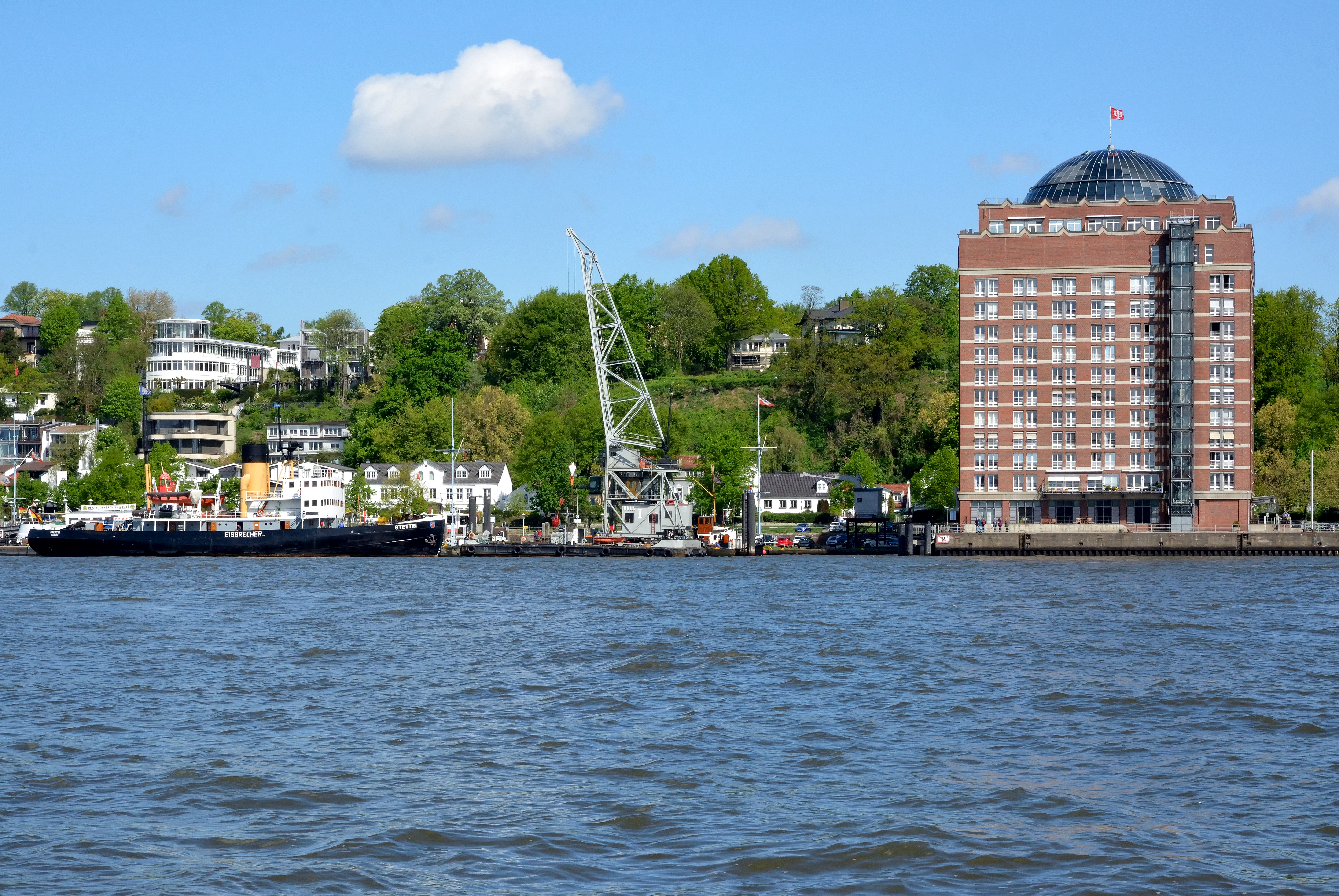 Impressionen eines Wochenendes in Hamburg mit dem Titel: Wikipedia:AhoiFotos der Barkassenfahrt am Samstag im Hamburger Hafen.Das Augustinum Hamburg in Hamburg am Museumshafen Öevelgönne.